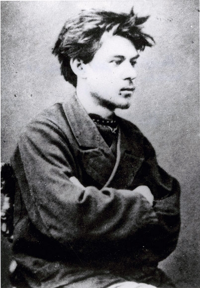 Тихомиров, Лев Александрович (1852-1922) (BG A13/885)